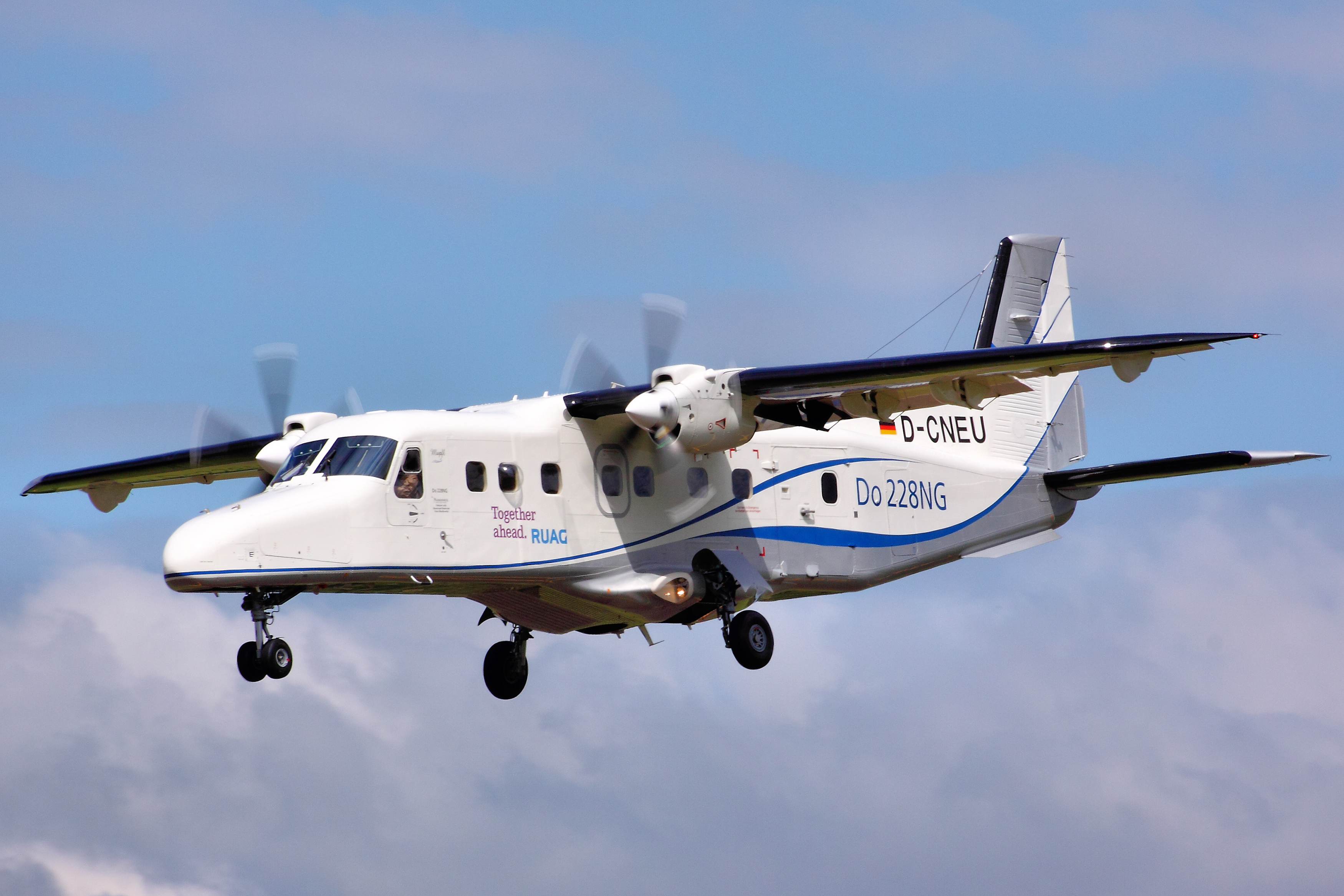 DO228NG - RIAT 2012